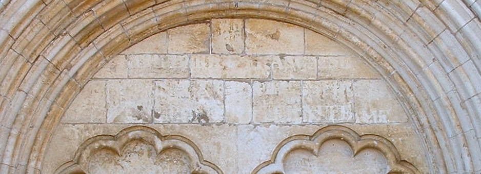 Montréal (Yonne) : inscriptions républicaines sur le tympan de la collégiale Notre-Dame